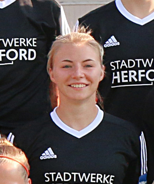 Herforder SV Borussia Friedenstal Team 2014/2015